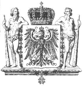 Königlich - Preußisches Wappen von 1701